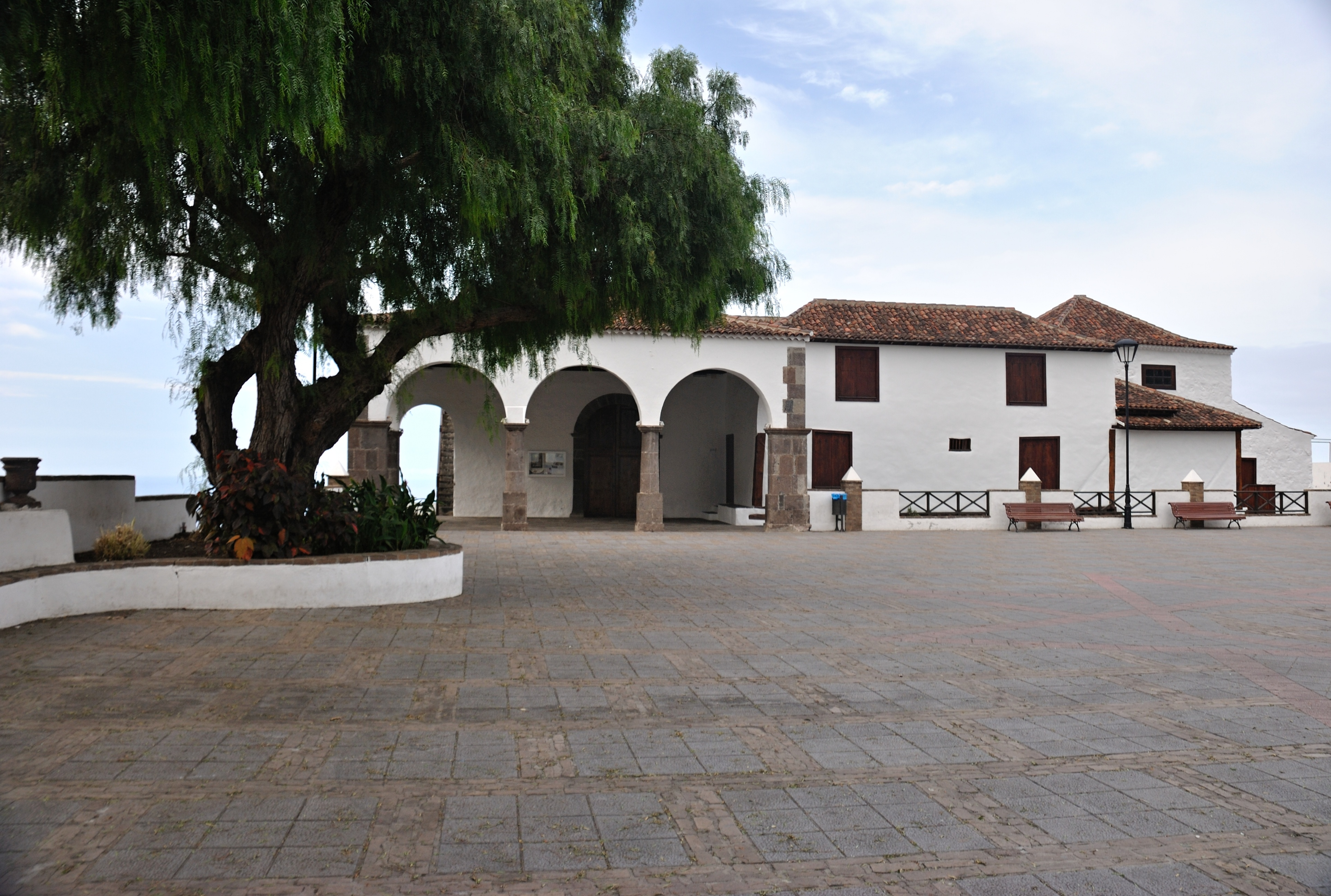 Vista desde la plaza de la parte delantera.